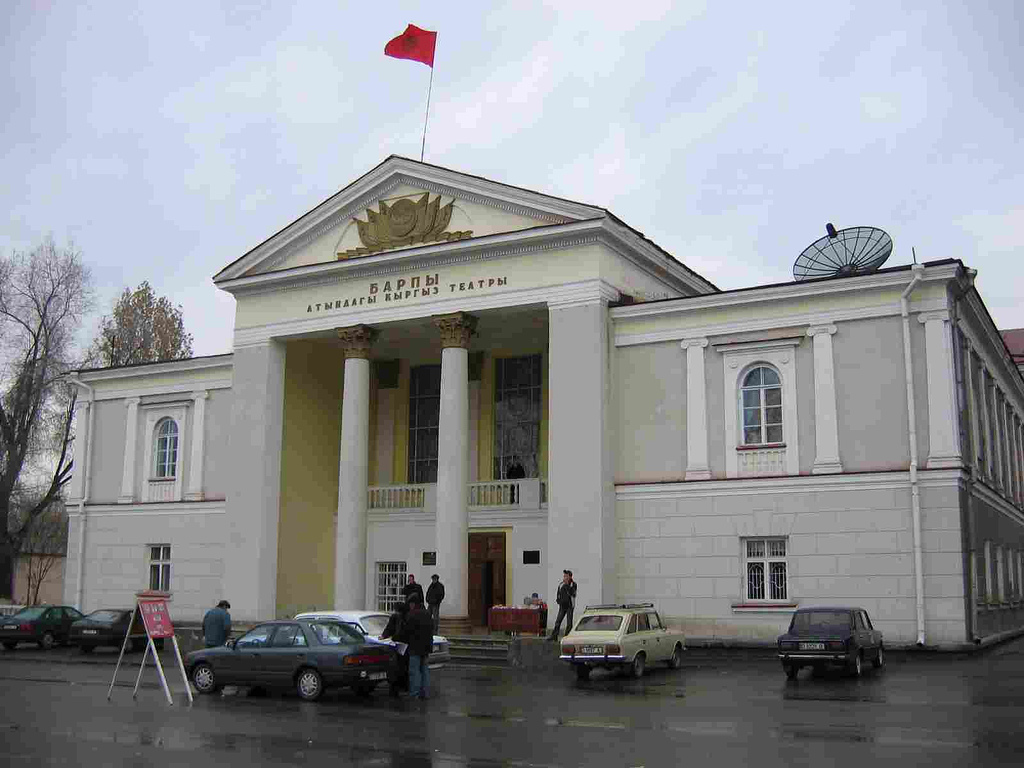 Jalalabad 1